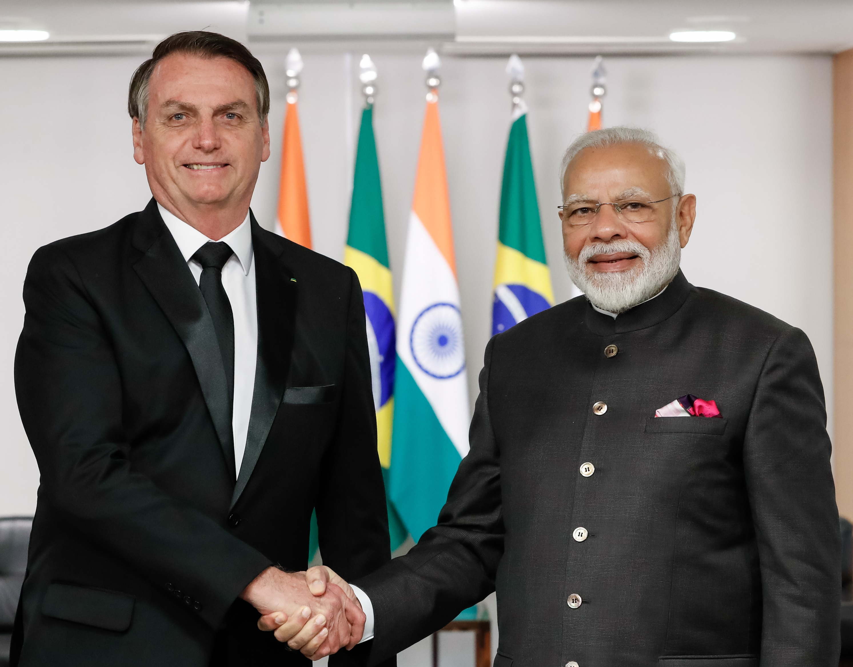 (Brasília - DF, 13/11/2019) Encontro com o Primeiro-Ministro da República da Índia, Norenda Modi. Foto: Alan Santos/PR